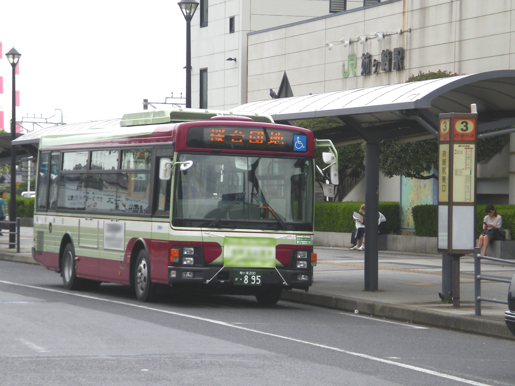 いすゞ・エルガミオ 袖ケ浦200か895 千葉県市原市・JR姉ケ崎駅にて投稿者本人が撮影。